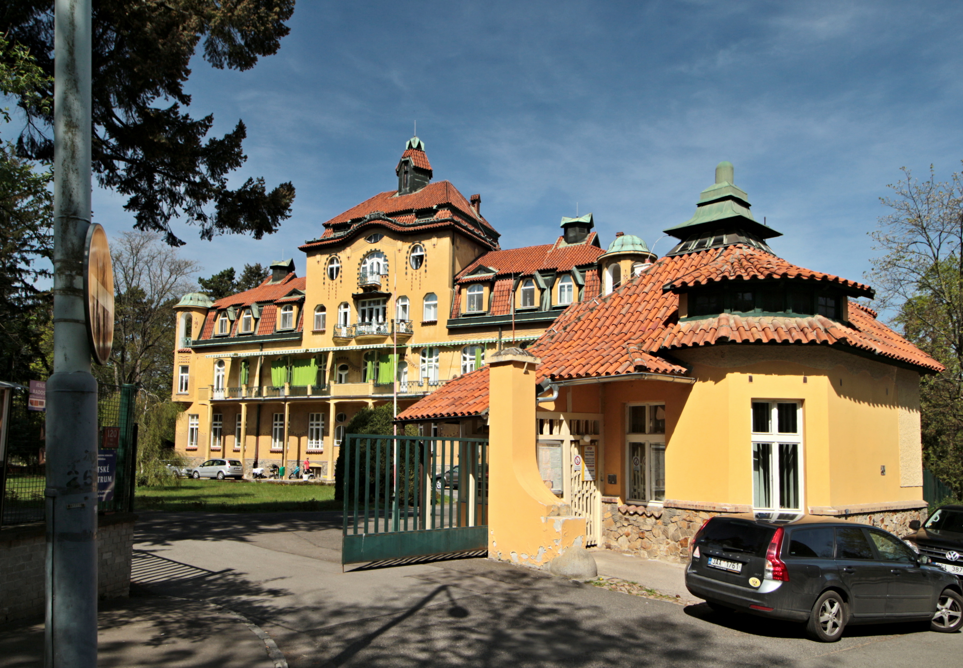 Šimsovo sanatorium, dnešní Kojenecký ústav v Praze-Krči